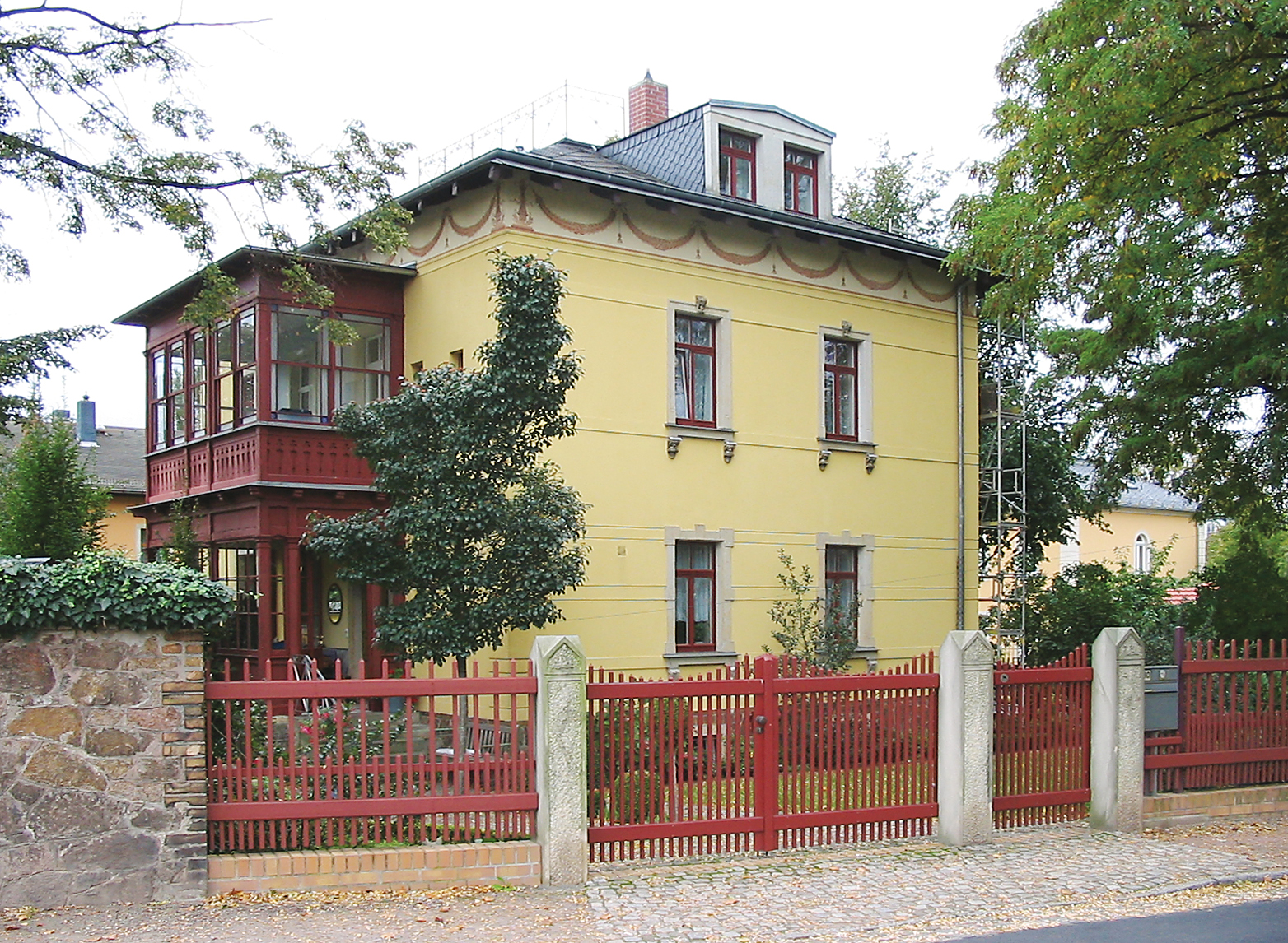 Radebeul, Mietvilla Nizzastraße 30